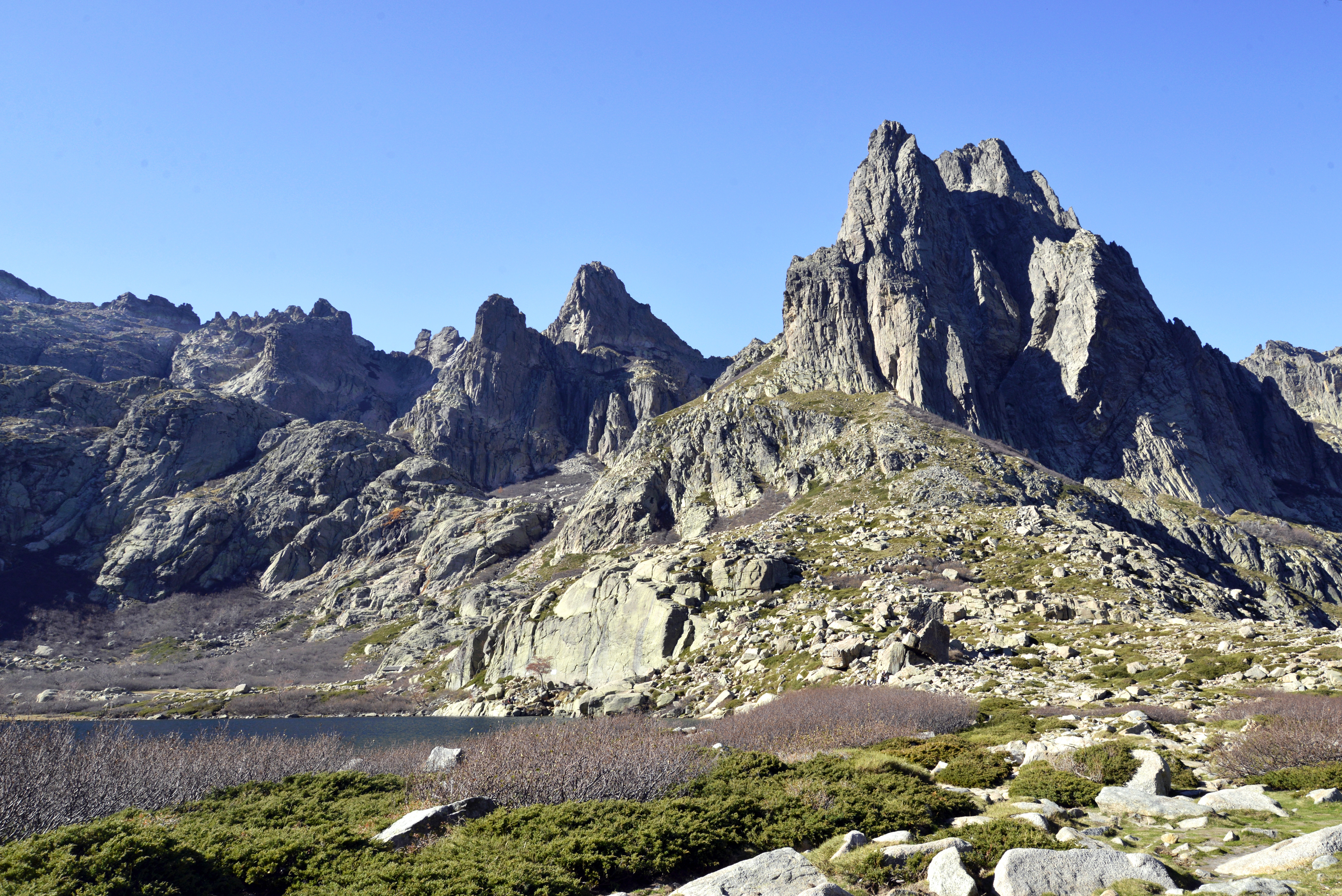 Corte, Centre Corse (Haute-Corse) - Le lac de Melo par lequel transite la rivière Restonica, est dominé par le Lombarduccio (2261 m) du massif du Rotondo. Au premier plan, genévriers et aulnes odorants (espèce endémique corse Alnus viridis ssp. suaveolens) qui ont perdu leurs feuilles.